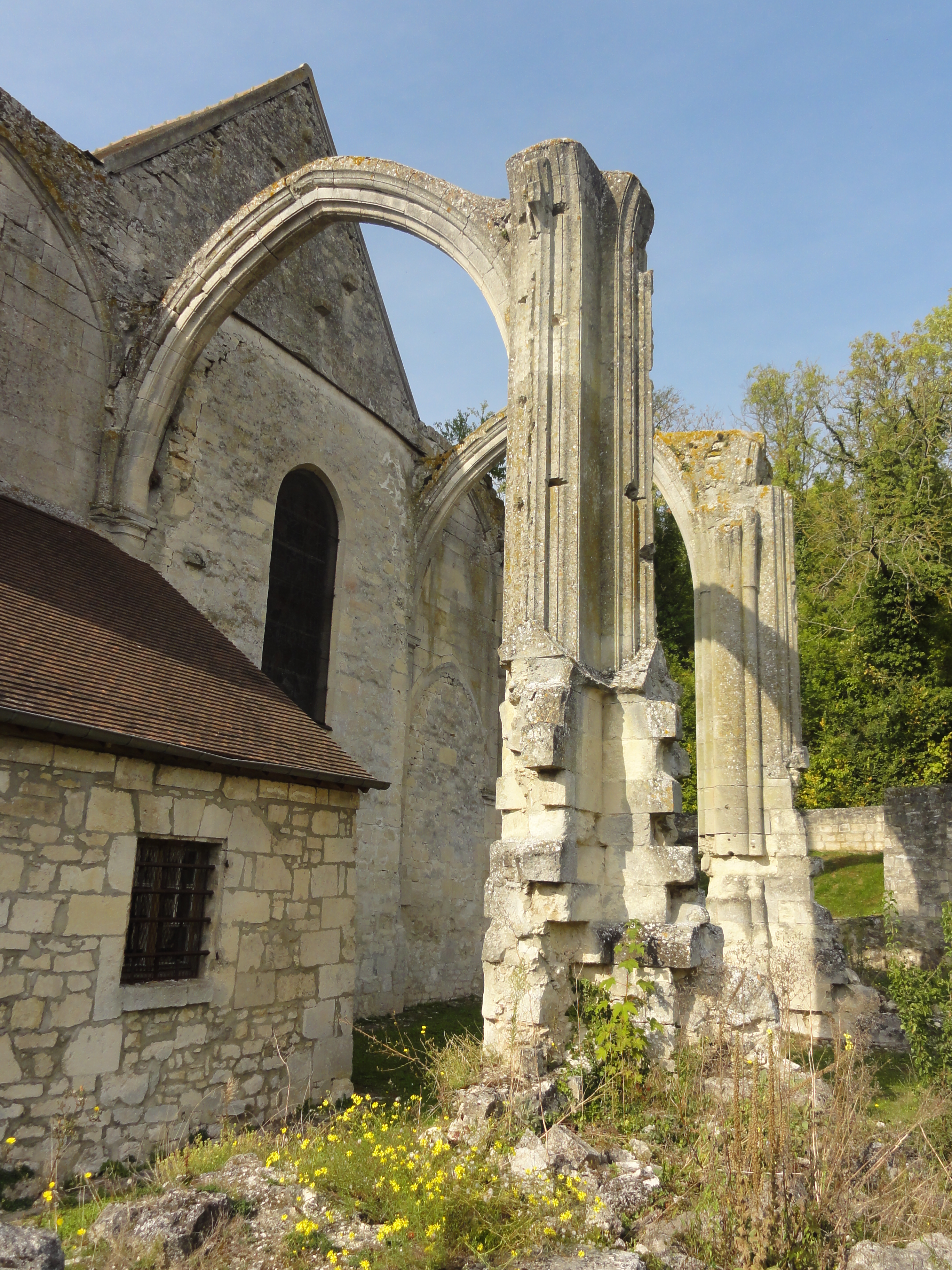 Église Saint-Martin de Bouillant - voir titre.